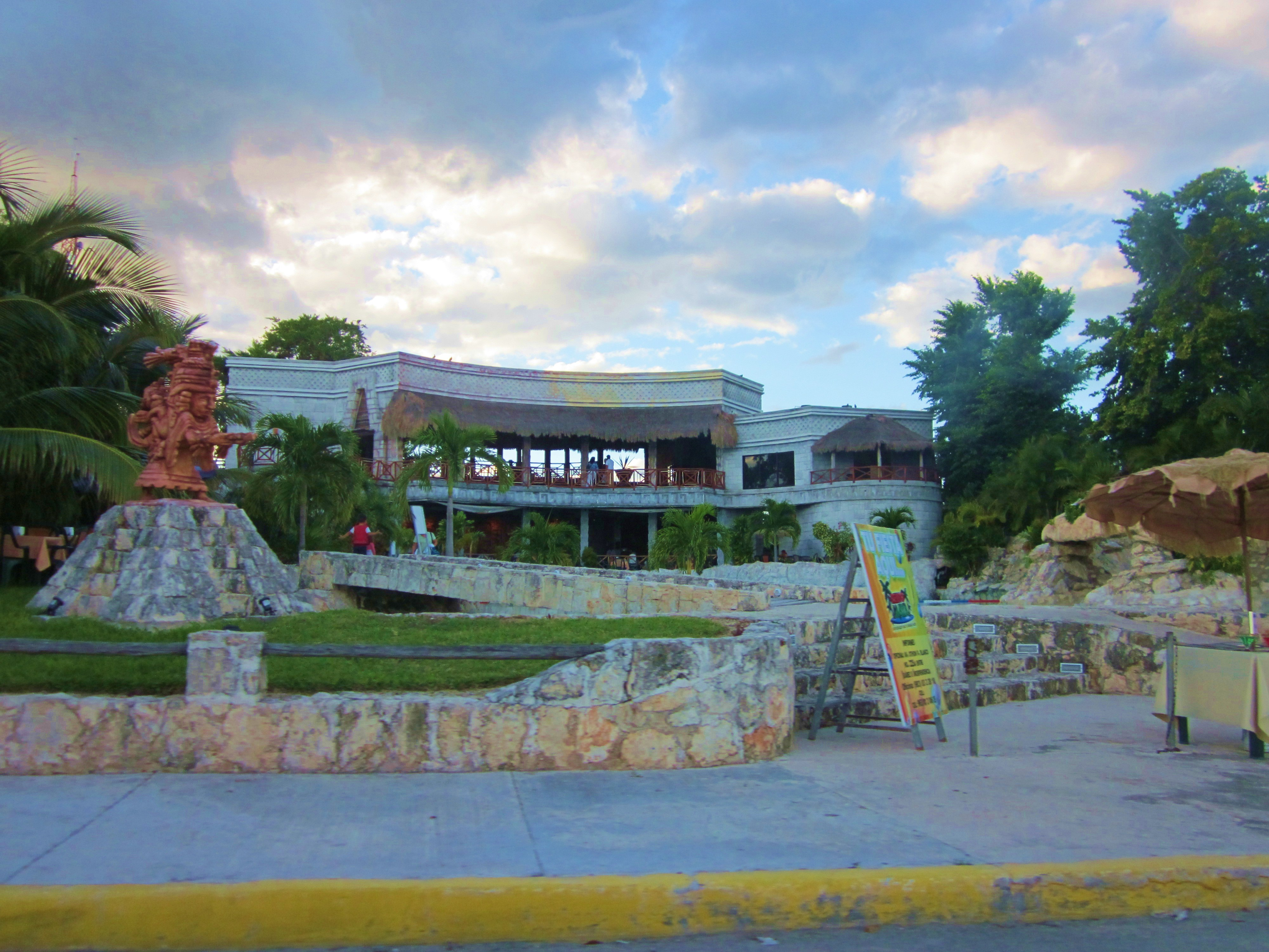 Balneario en Calderitas, Q. Roo